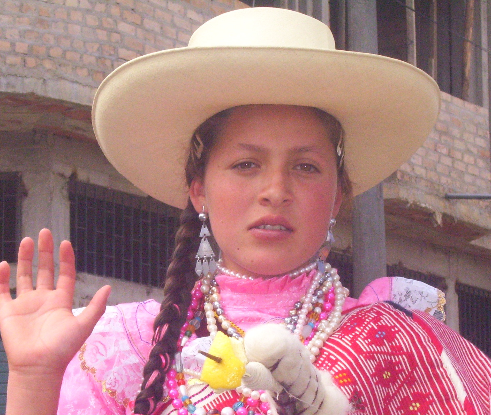 Rubely Torres, Reina de Cadmalca Alto, Chota, Perú.